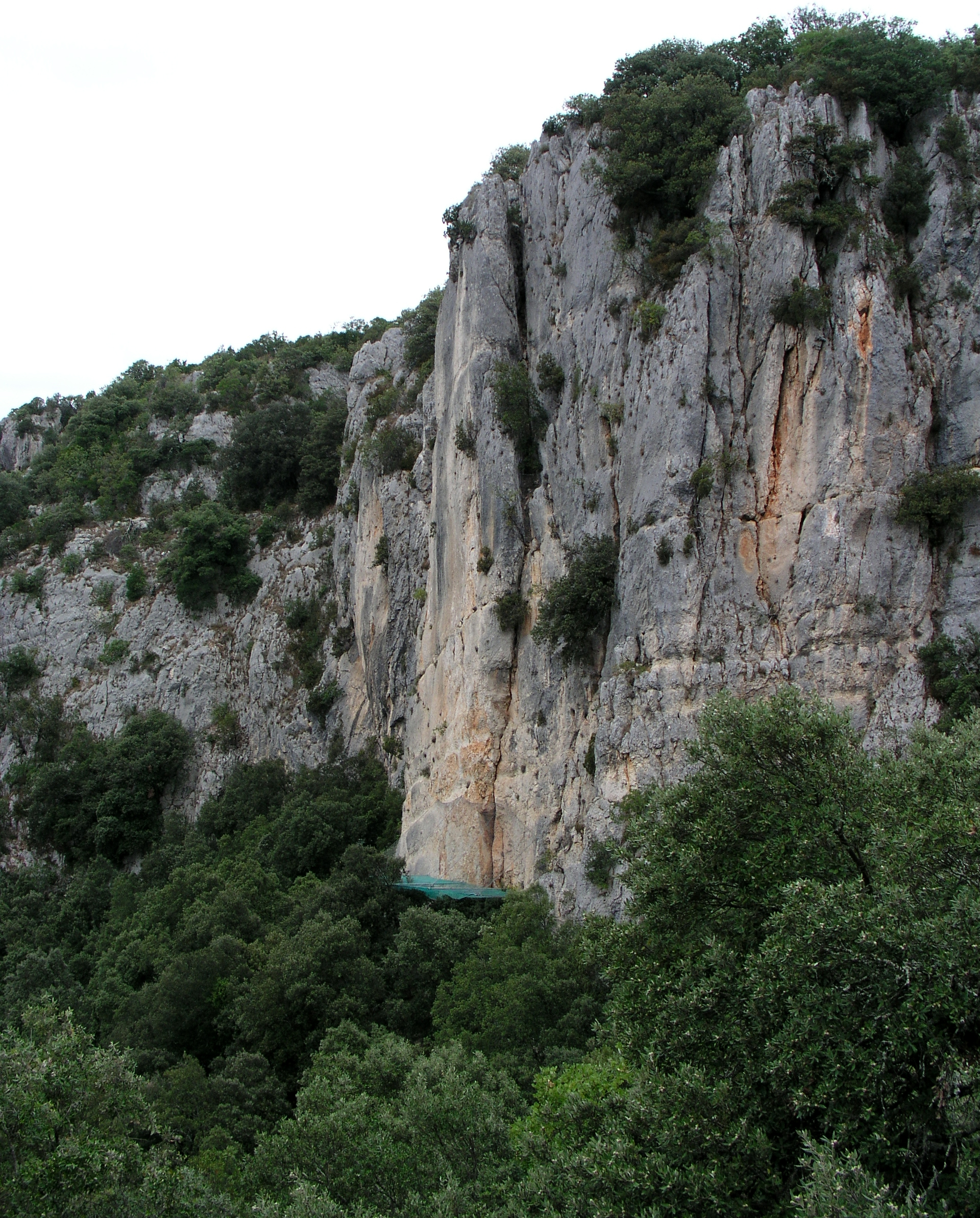 Rocher d'Abraham près de la Grotte Chauvet